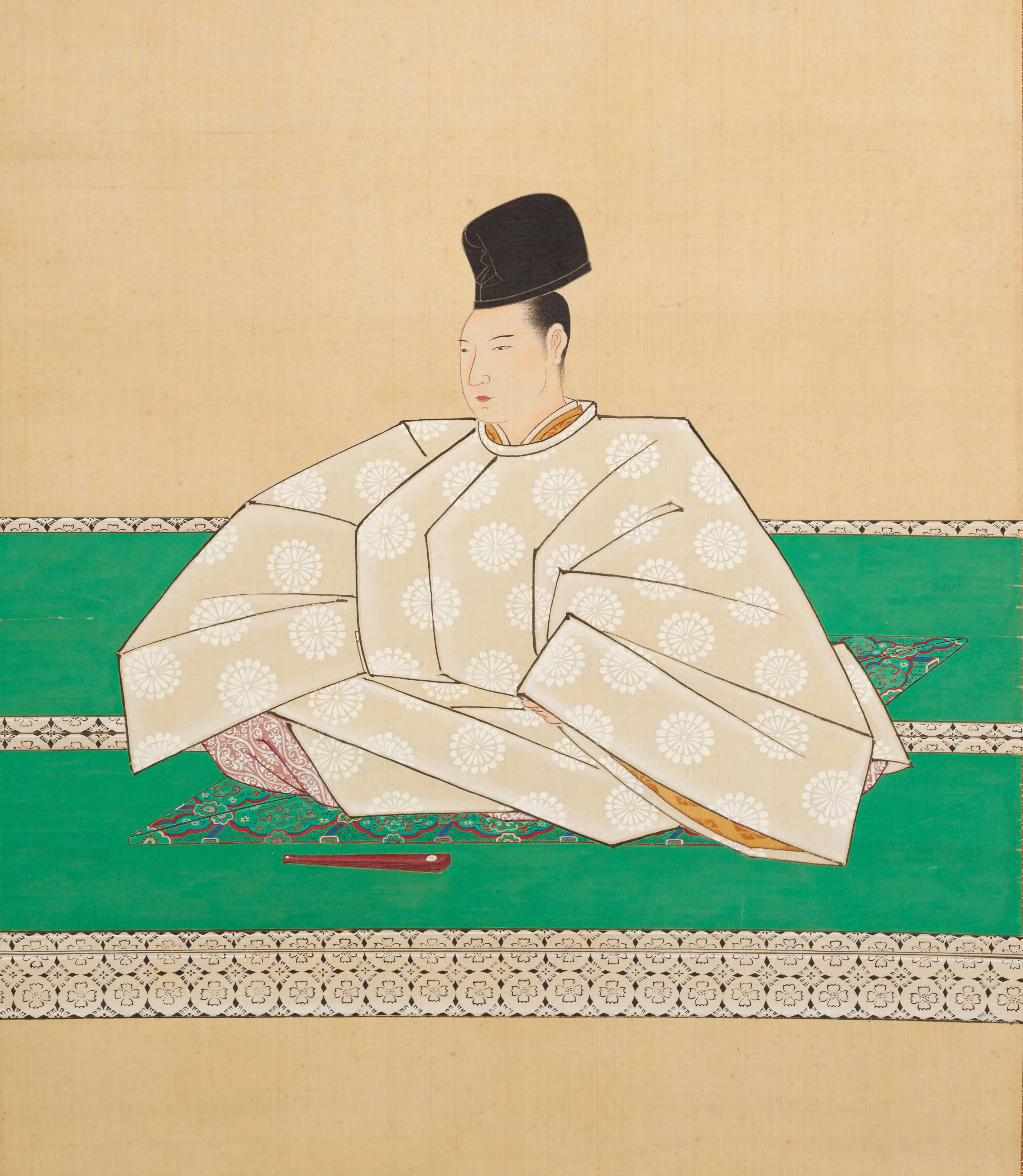 閑院宮愛仁親王の肖像。